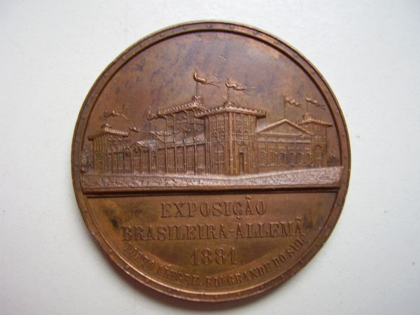 Medalha da Exposição Brasileira-Allemã - 1881, ocorrida em Porto Alegre